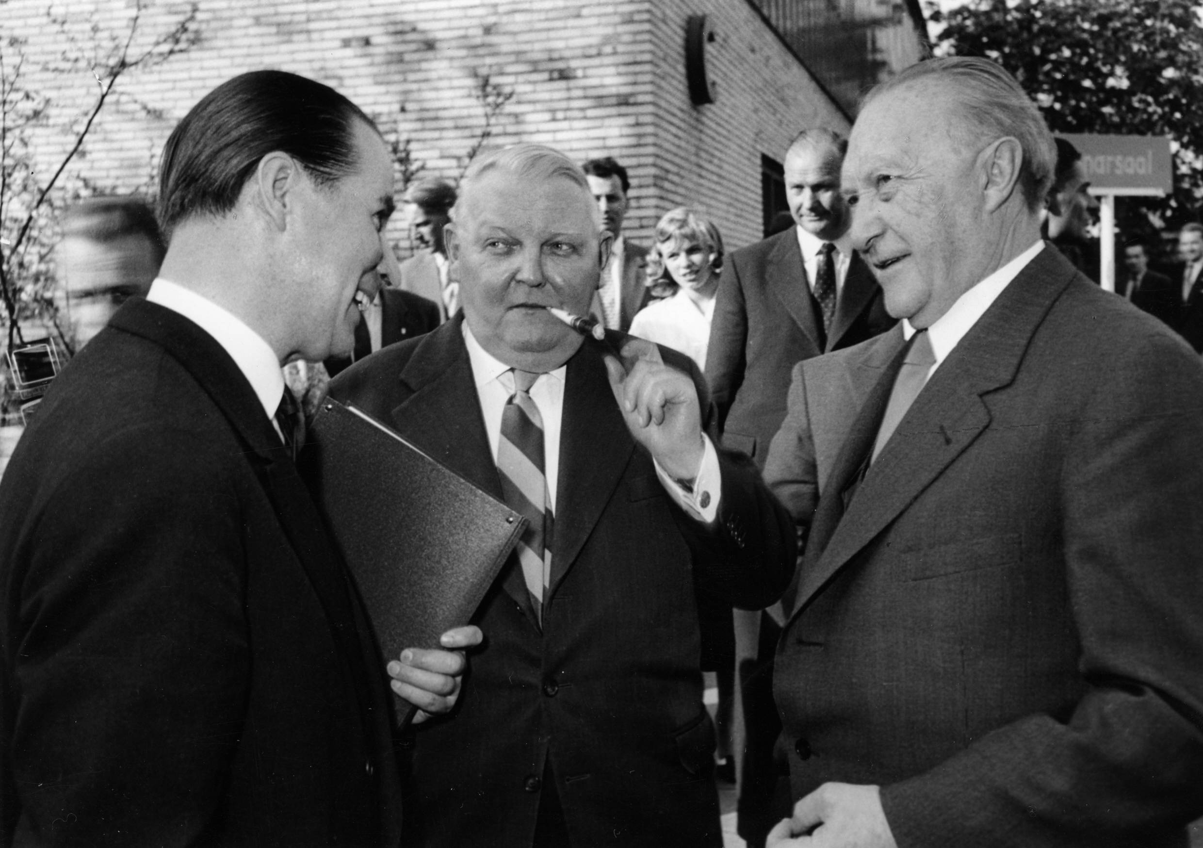 Adenauer, Konrad7. CDU-Bundesparteitag, 12.05.1957 - 15.05.1957